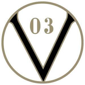 Logo Viktoria Zerbst